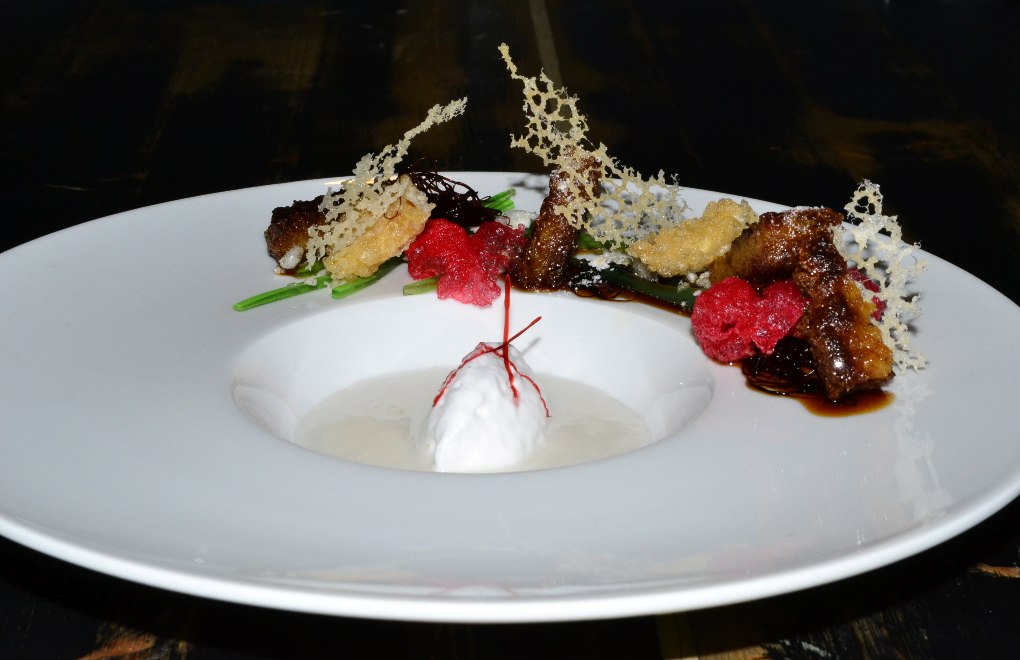 Plat Note à Note d'inspiration asiatique, lauréat du concours international de cuisine Note à Note 2014